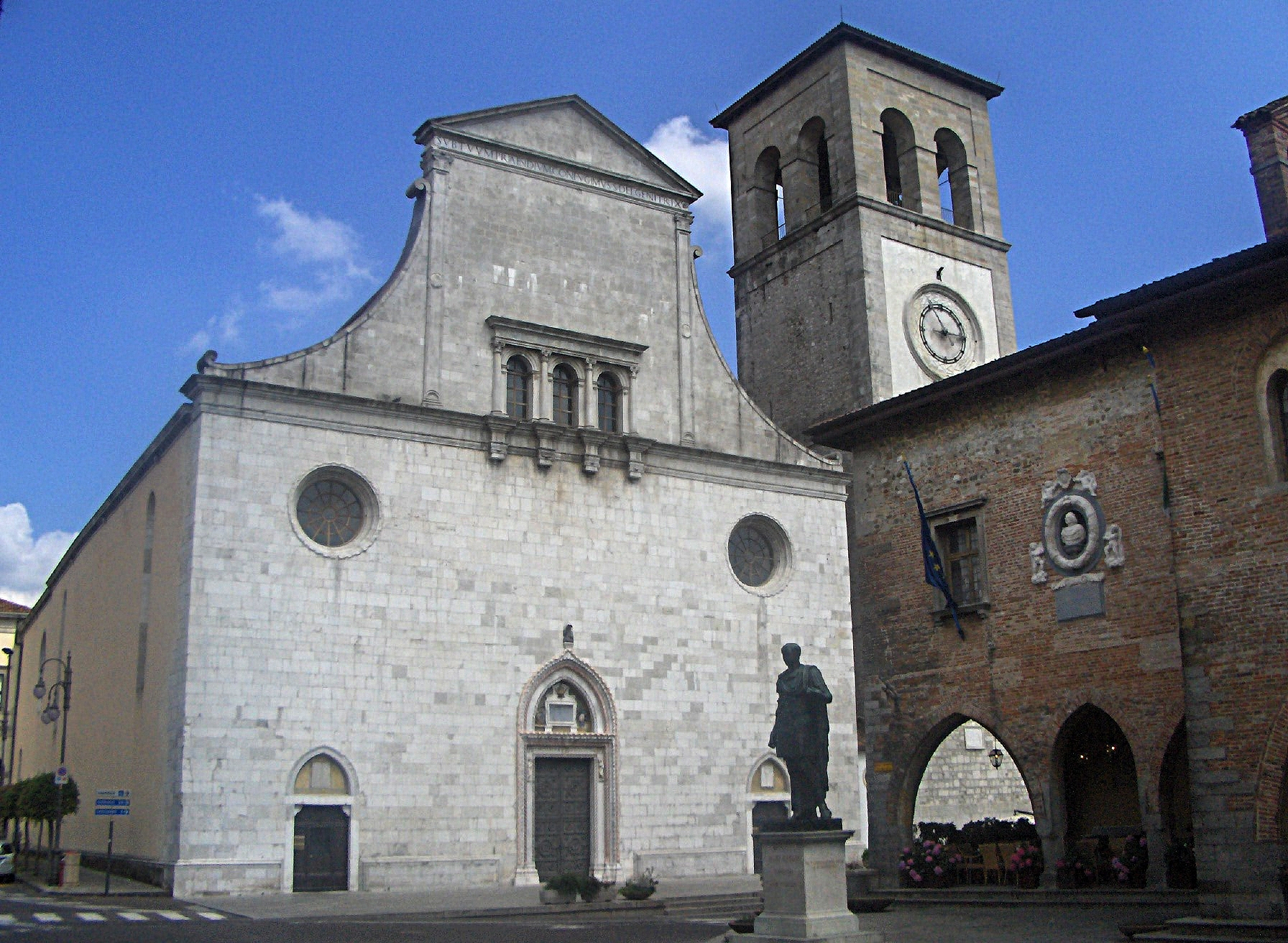 Cividale del Friuli, Il Duomo. Foto di Sebi1.